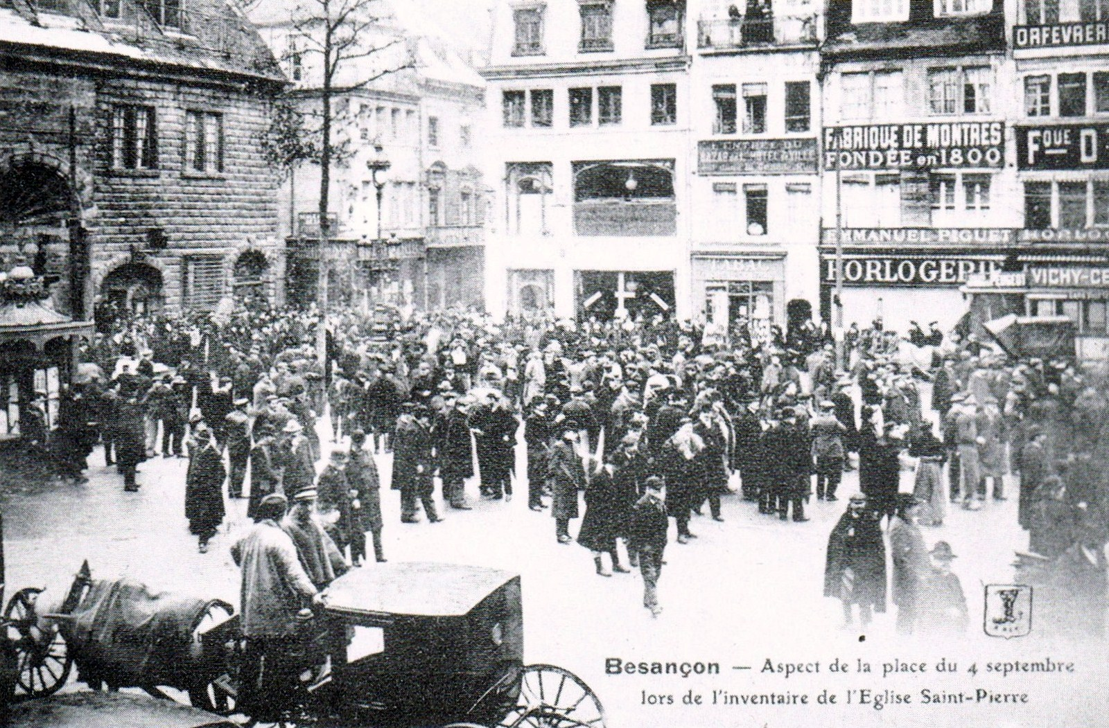 Inventaire de l'église Saint-Pierre de Besançon (Doubs, France).